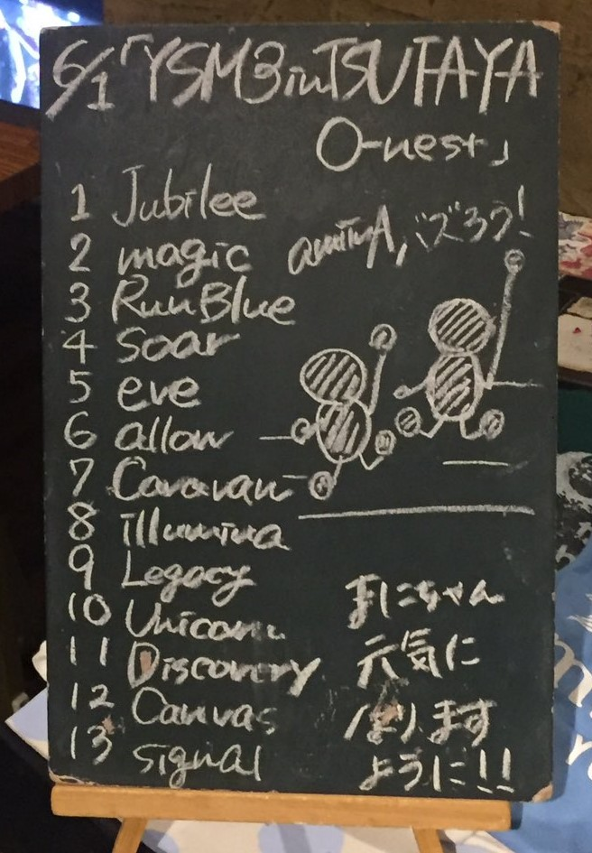 amiinAセトリボード